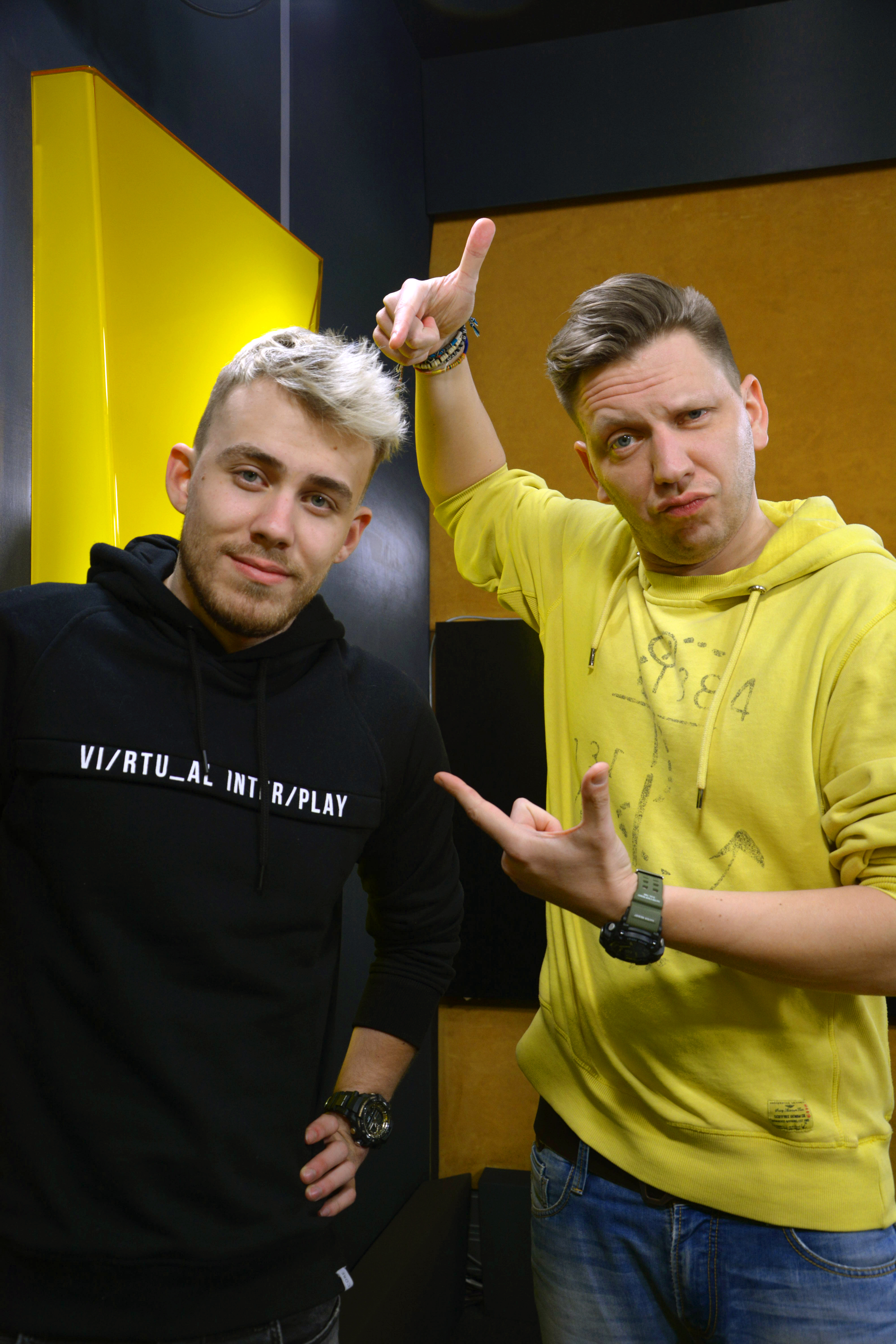 Blowek w studiu Czwórki Polskiego Radia po tym jak trafił na pozycję nr 1 polskiego YouTube, stając się pierwszym w historii twórcą z 4 mln subskrypcji w naszym kraju. Wywiad z vlogerem przeprowadził Kuba Marcinowicz (na zd.).